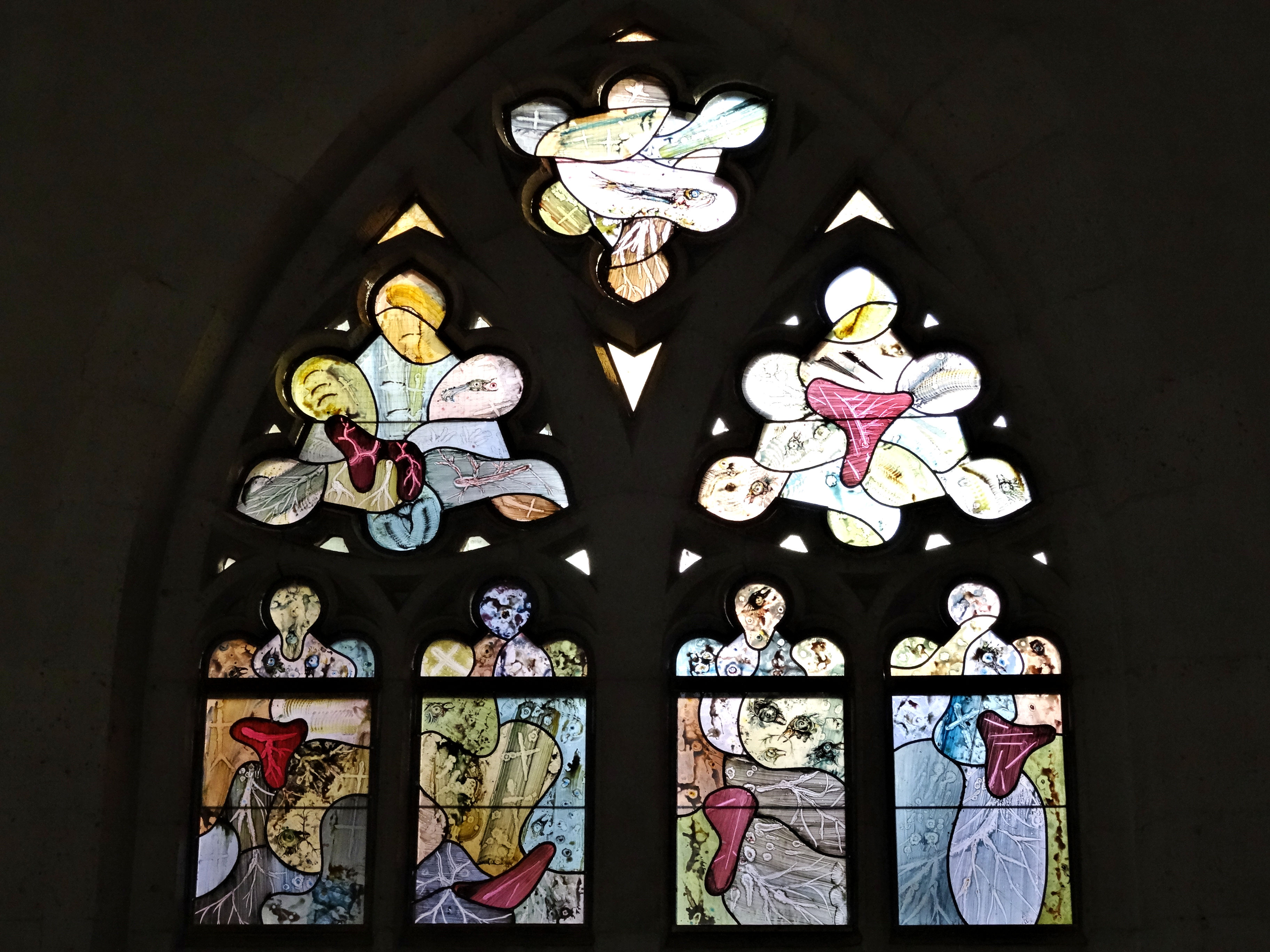 Stigmata (2001) van Marc Mulders, glas-in-loodraam in de Stevenskerk